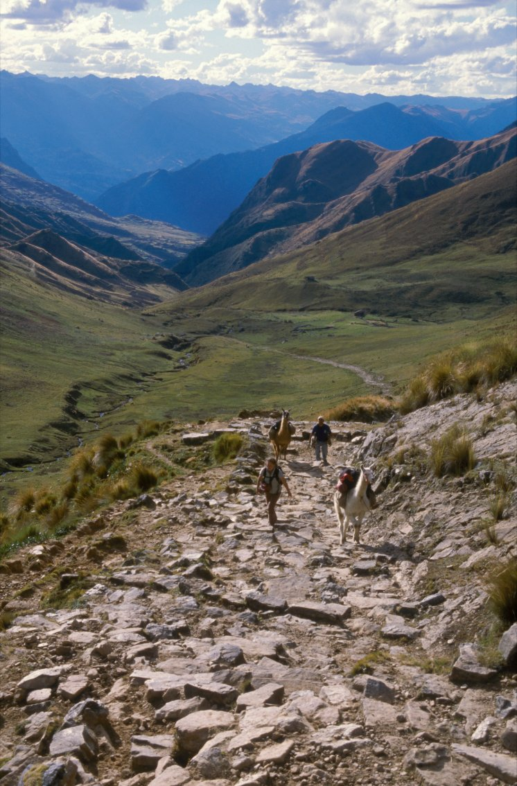 Superbe section du Qhapaq Ñan, la Grande Route Inca, au Pérou à l'est de la Cordillère Blanche